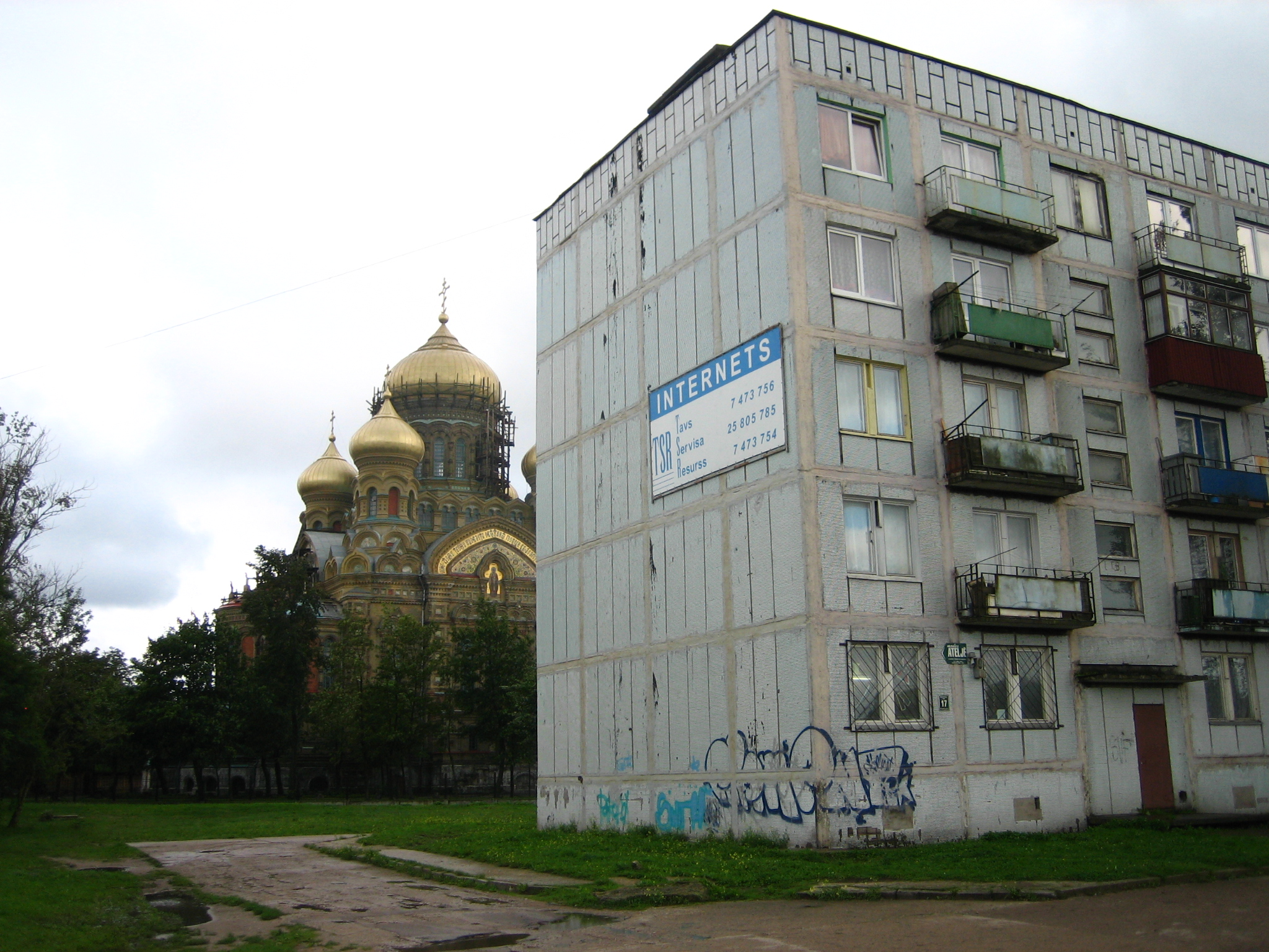 St Nicolai Church, Karosta, Liepaja, Latvia.